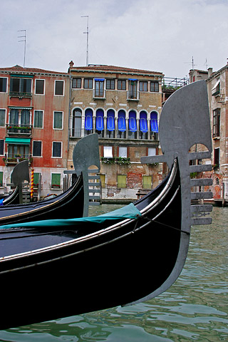 gondolas in Venice